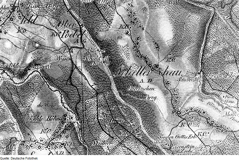 Original image description from the Deutsche Fotothek Altenberg-Schellerhau. Oberreit, Sect. Altenberg, 1821